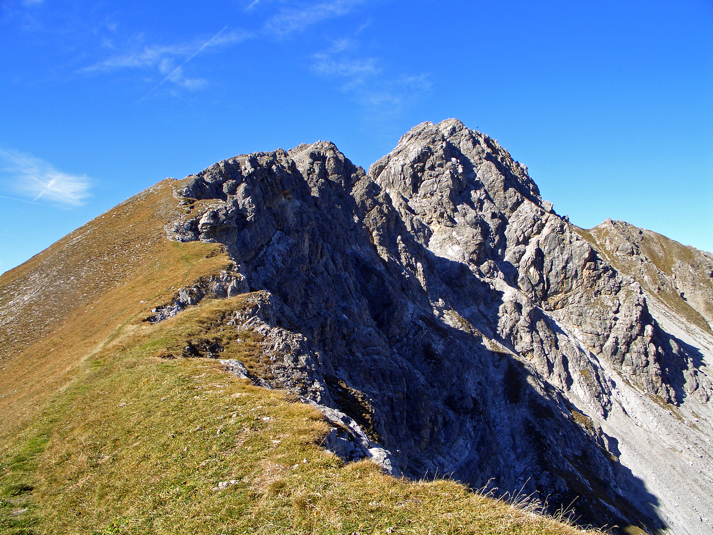 Loreakopf vom Aufstiegsweg zwischen Loreascharte und Gipfel